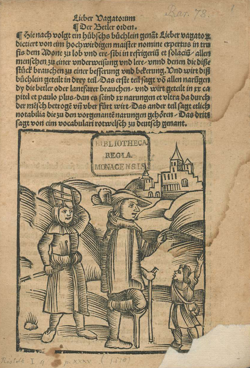 Titelblatt des 1510 in Pforzheim erschienenen Liber Vagatorum